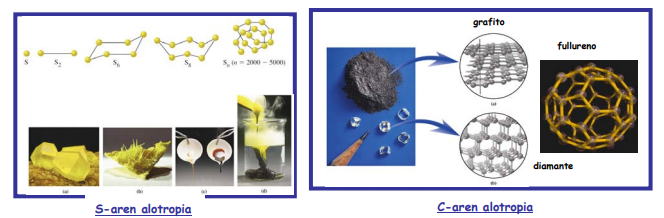 S eta C-ren alotropia